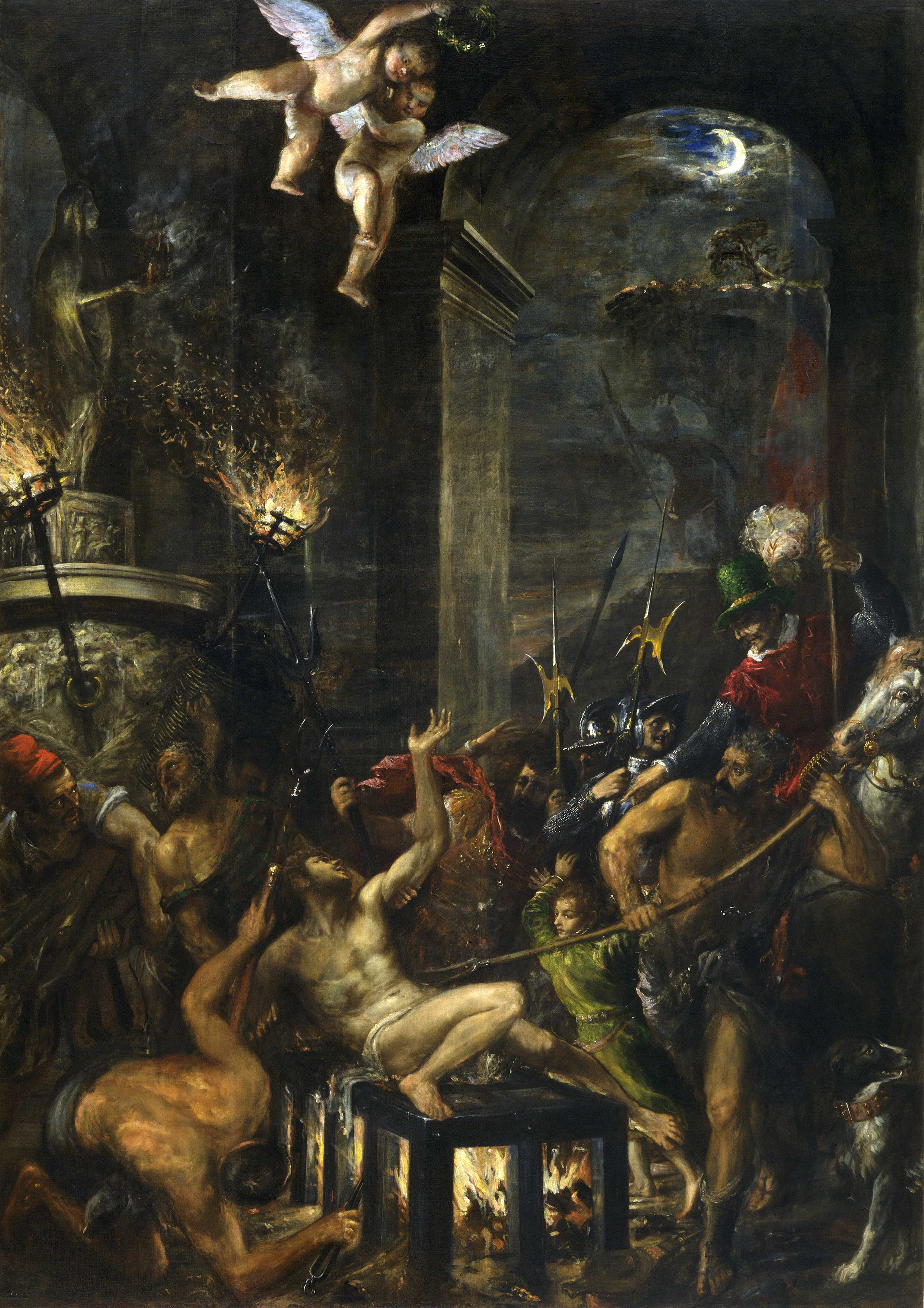 El lienzo representa el martirio de San Lorenzo, que según la tradición fue asado en una parrilla.